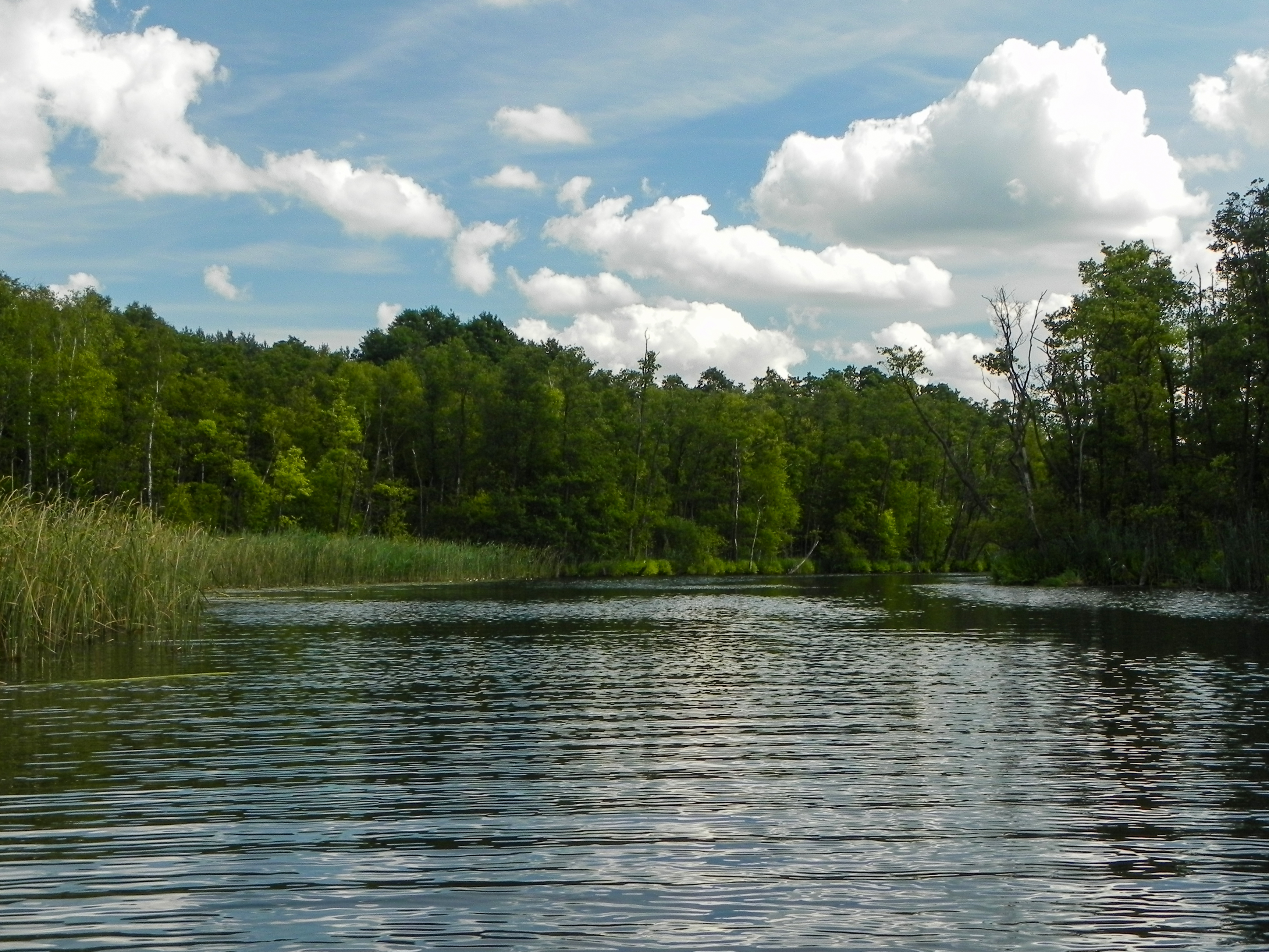 Landschaftsschutzgebiet „Neustrelitzer Kleinseenplatte“ (LSG L38) in Mecklenburg-Vorpommern: Die Drosedower Bek zwischen Rätzsee und Gobenowsee